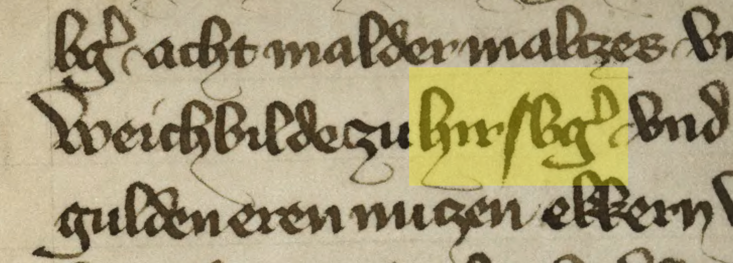 Dokument Wenzels von Luxemburg aus dem Jahr 1384 in dem u.a. der Ort Hirschberg in Schlesien (als Weichbilde zu Hirsbg.) erwähnt wird.